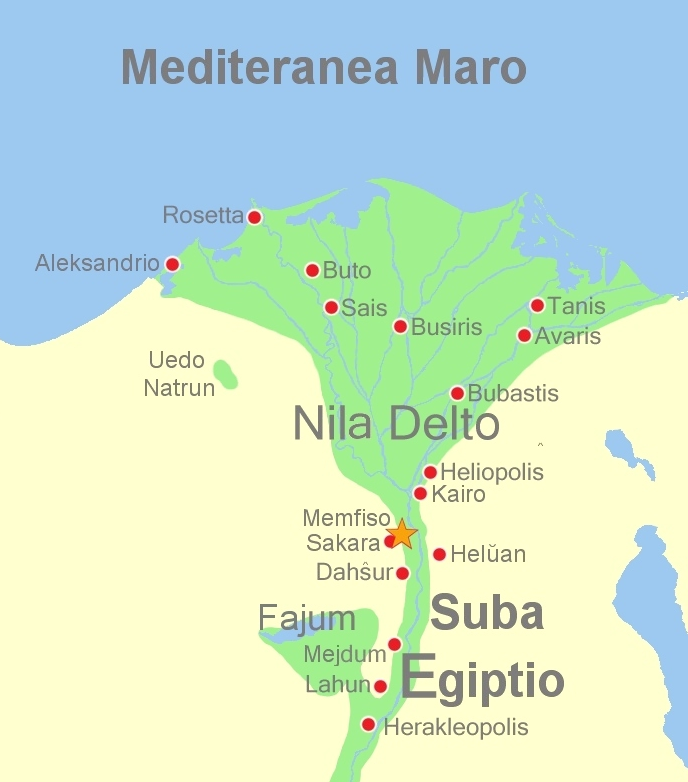 La antikva Suba Egiptio kun la ĉefurbo Memfiso Fonto: la dosiero Mapo de antikva Egiptio.jpg